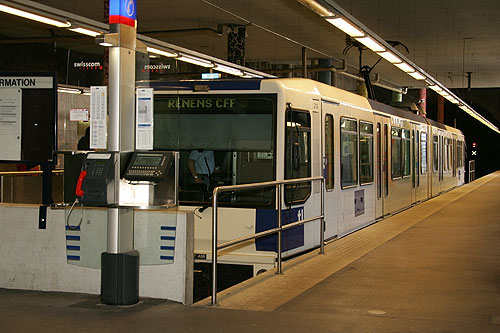 Lausanne: Métro à Lausanne-Flon